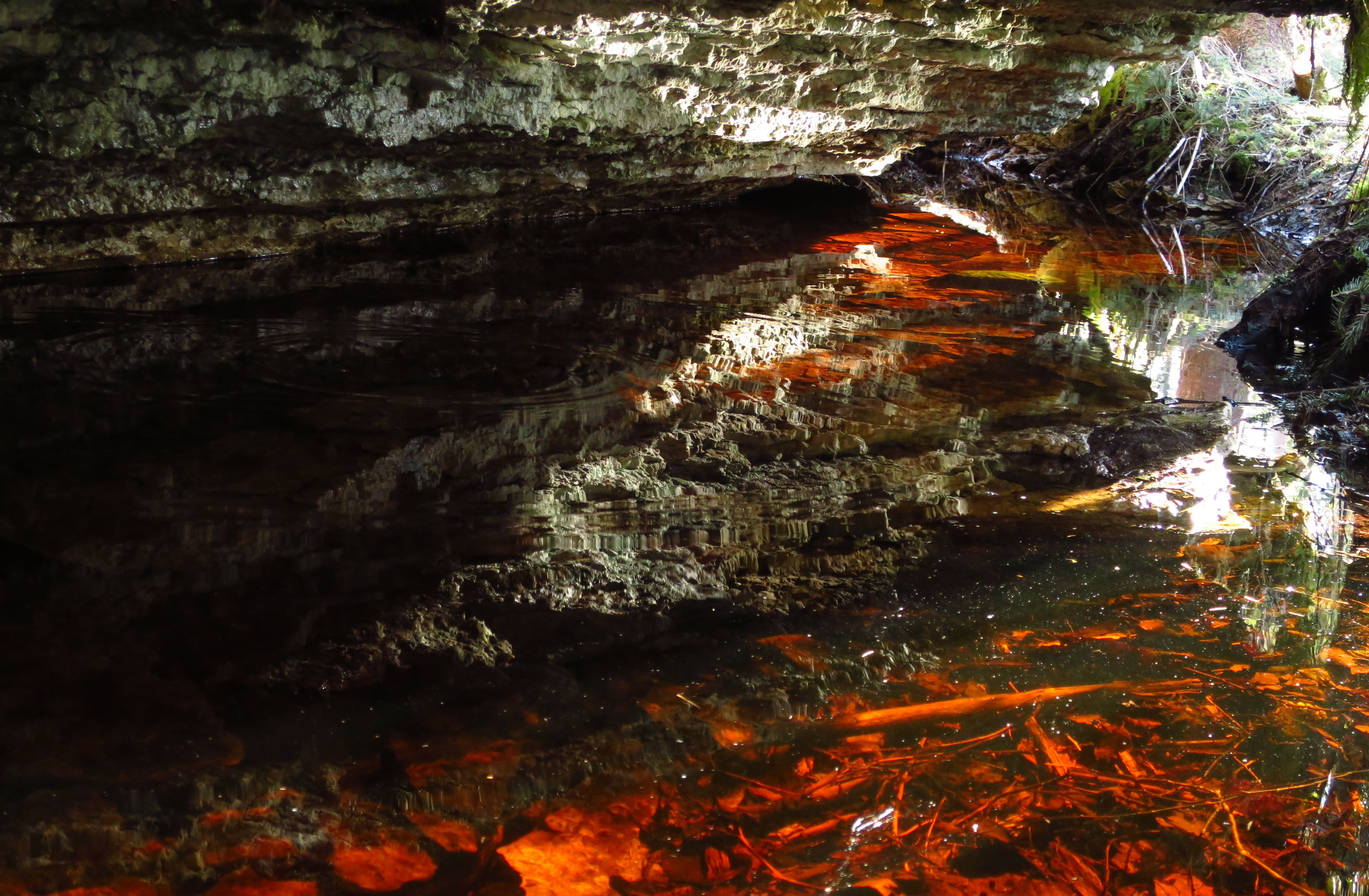 Palamulla karstiala